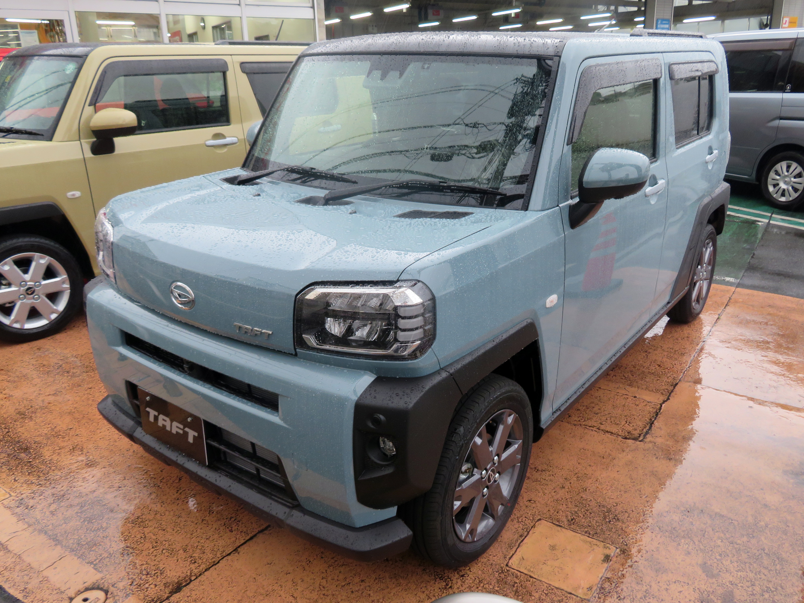 5BA-LA900S-GBGZ型ダイハツ・タフトGターボ2WDをフロントから撮影。